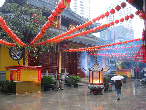 Shanghai Jade Buddha Temple